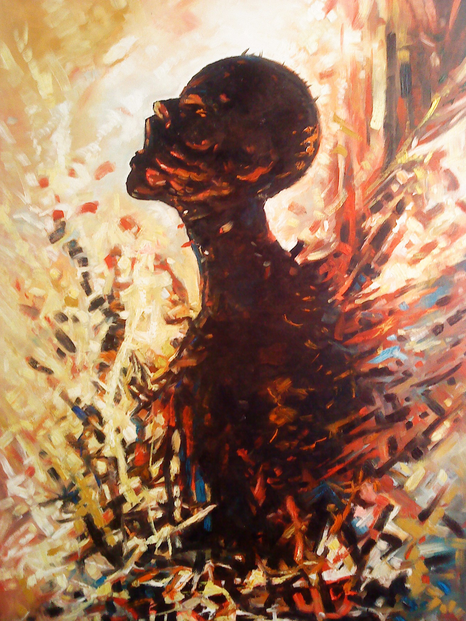 Na stosie’’ - rok 1998, 105x70 - olej na płótnie, fotografia Marek Kubski